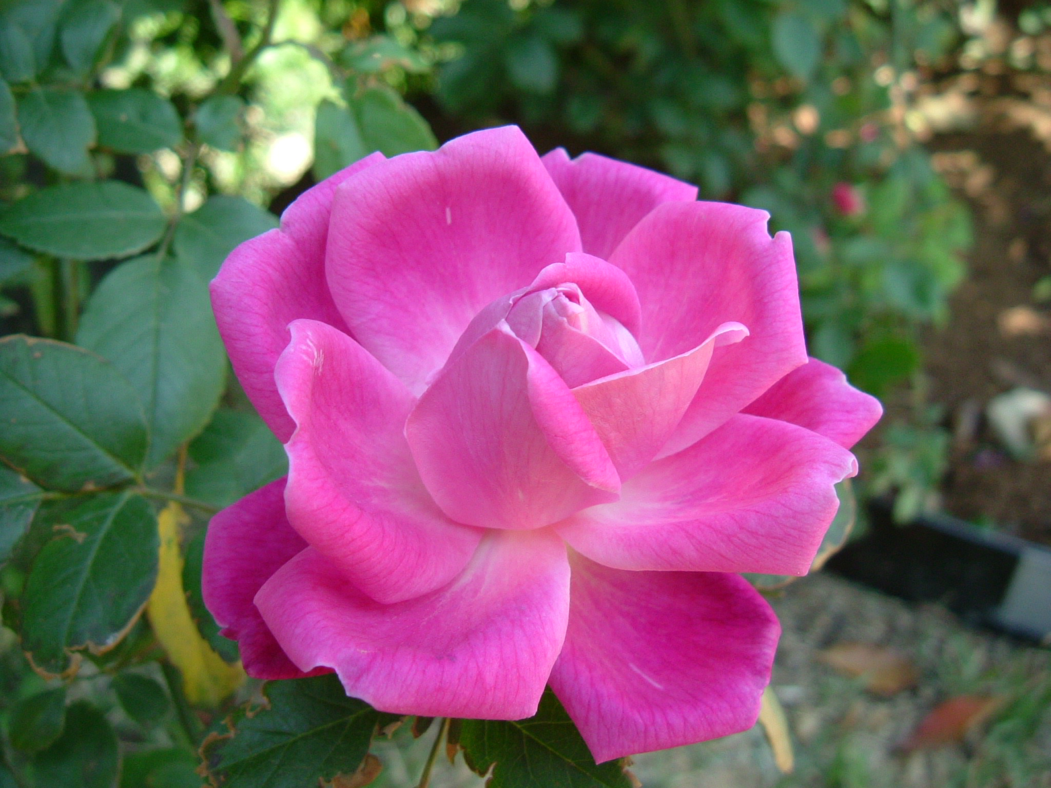 ロサ キネンシス Rosa chinensis